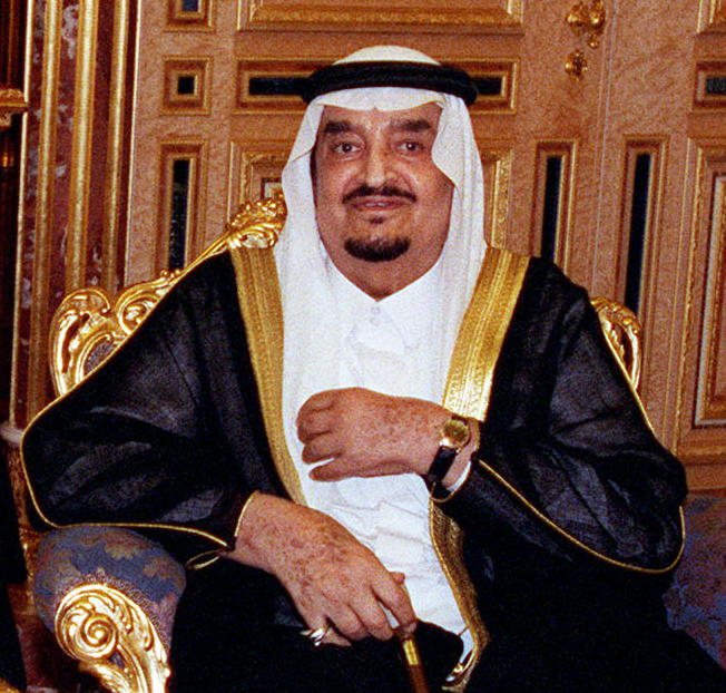 Fahd bin Abdul Aziz, October 13, 1998